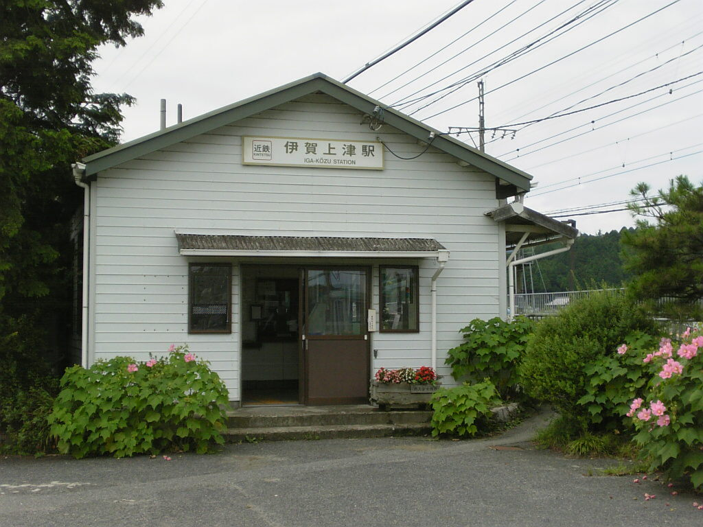 近鉄伊賀上津駅 2007年8月撮影。 機材：V604SH 撮影者：Kansai explorer